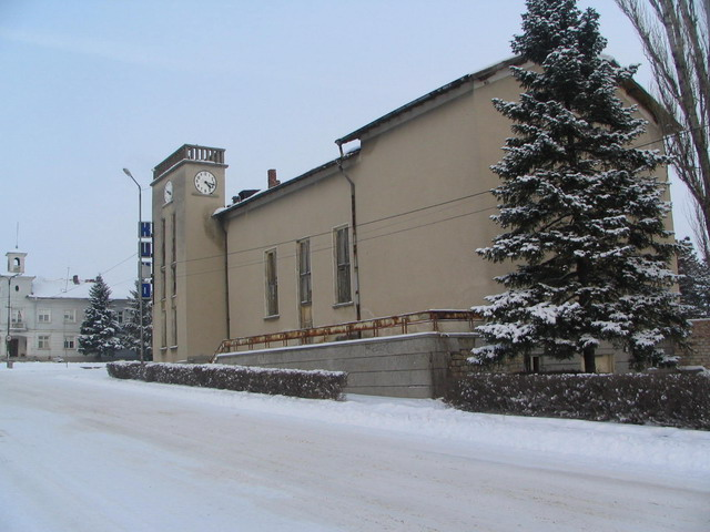 Старото читалище в Долна Оряховица с работещ часовник, на заден план-кметството.